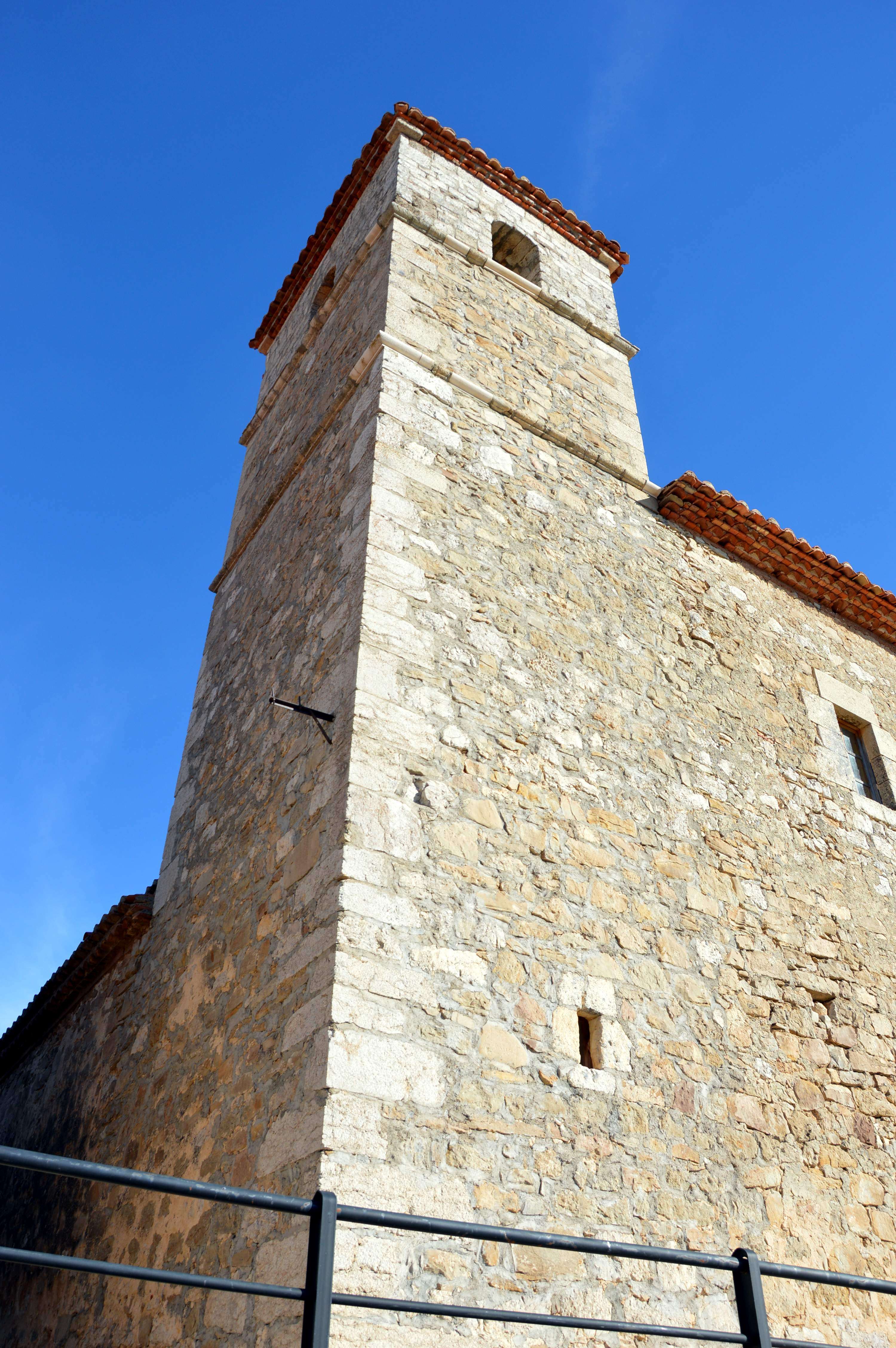 Detalle de la torre-campanario de la parroquial de la Sma. Trinidad en Veguillas de la Sierra (Teruel), siglo XVIII.